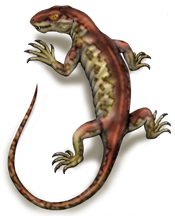 Galepus jouberti